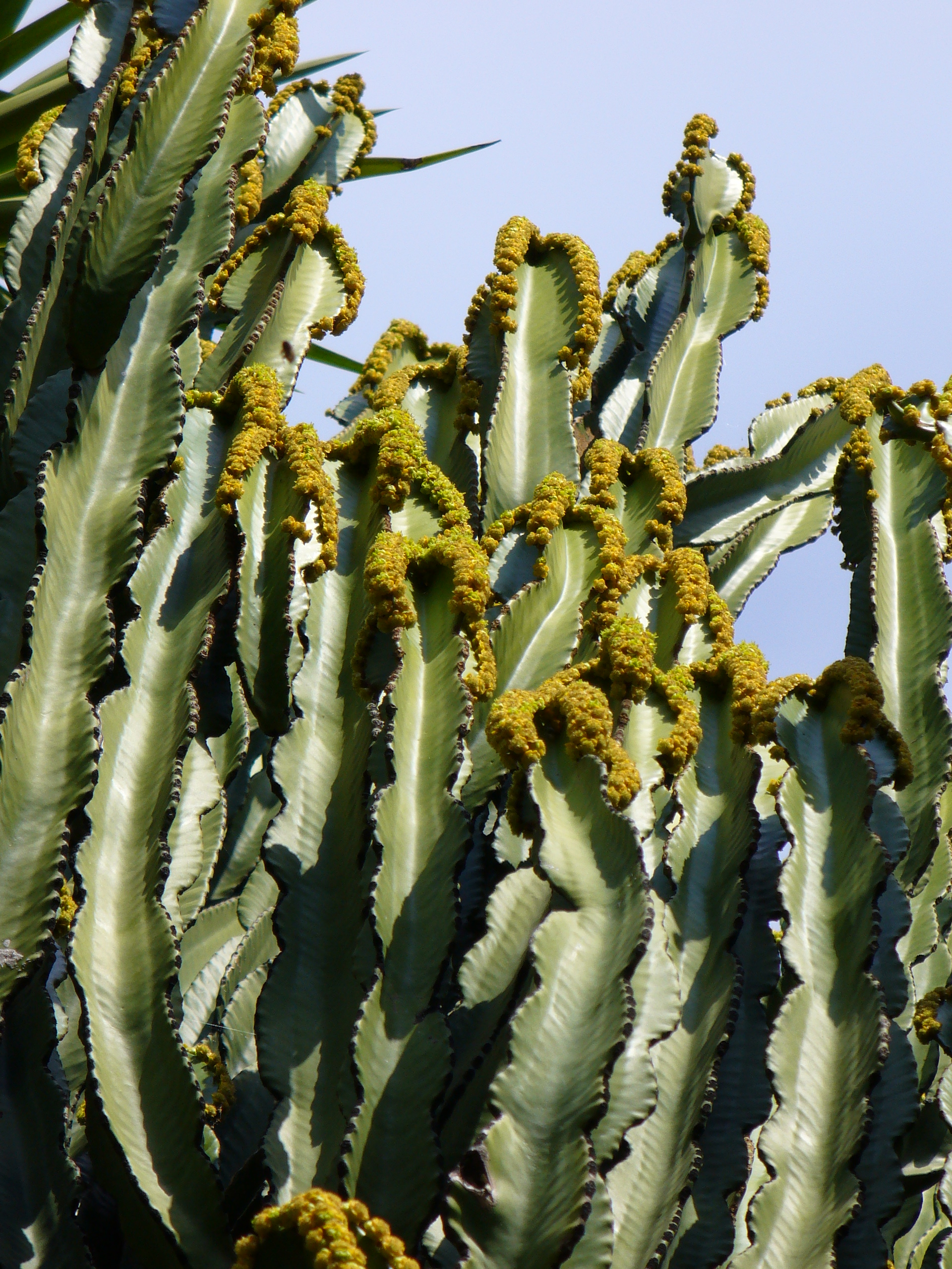 Euphorbia ingens, Jardin exotique de Monaco